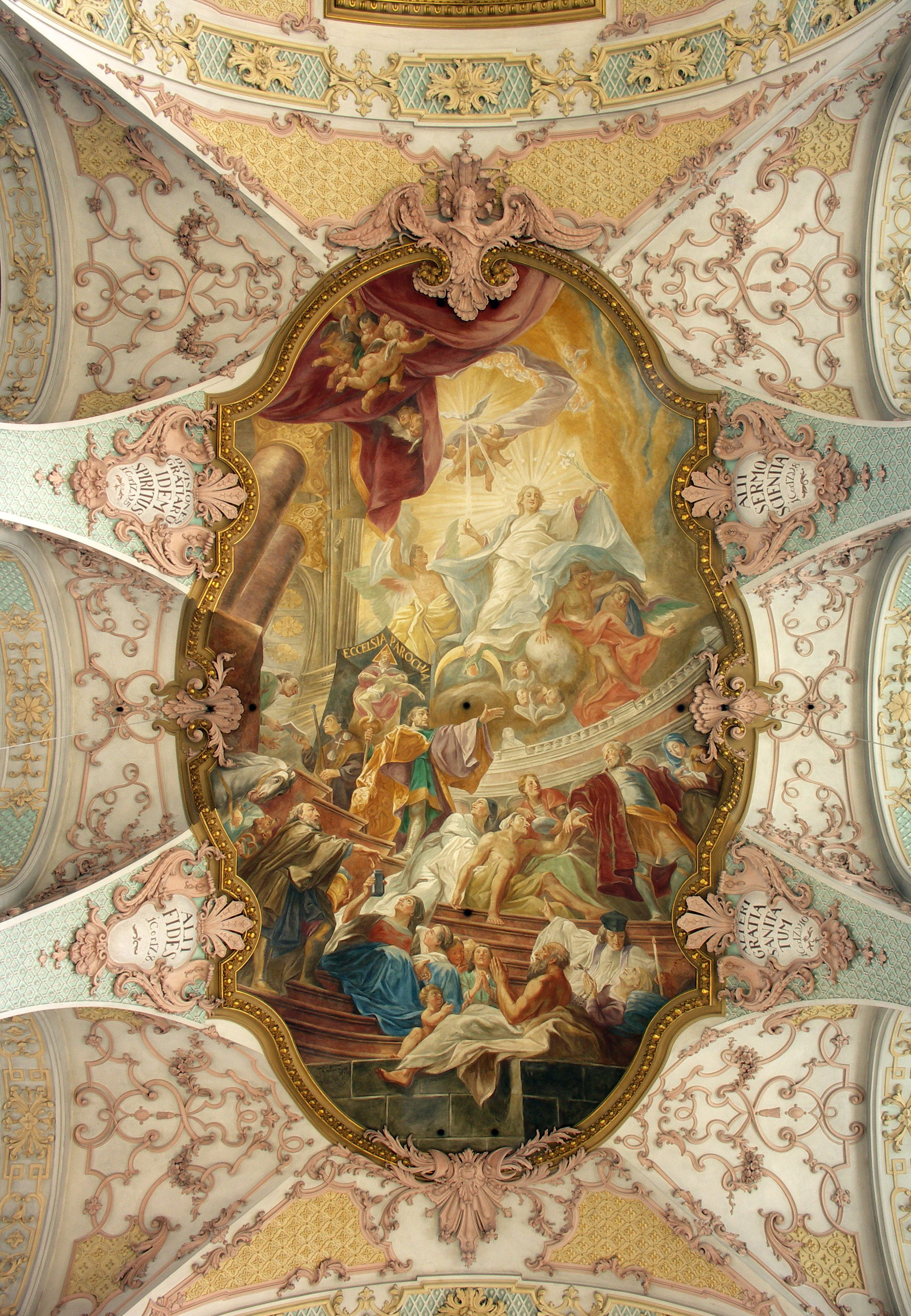 Deckenfresko im Langhaus der Heilig-Geist-Kirche in München, stellt die Gründungsgeschichte des Heilig-Geist-Spitals dar, Werk der Brüder Asam aus dem Jahr 1727